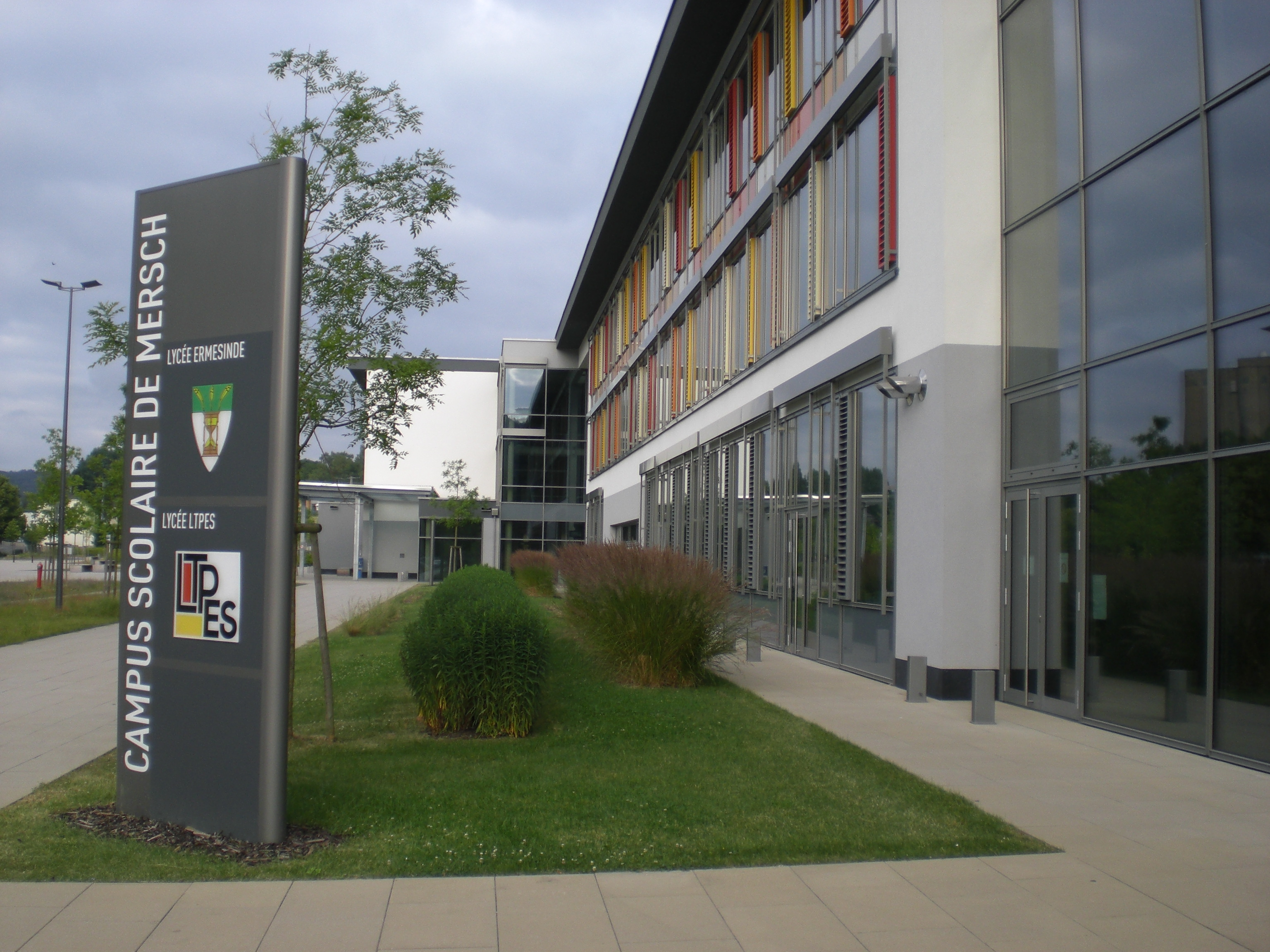 Lycée Ermesinde